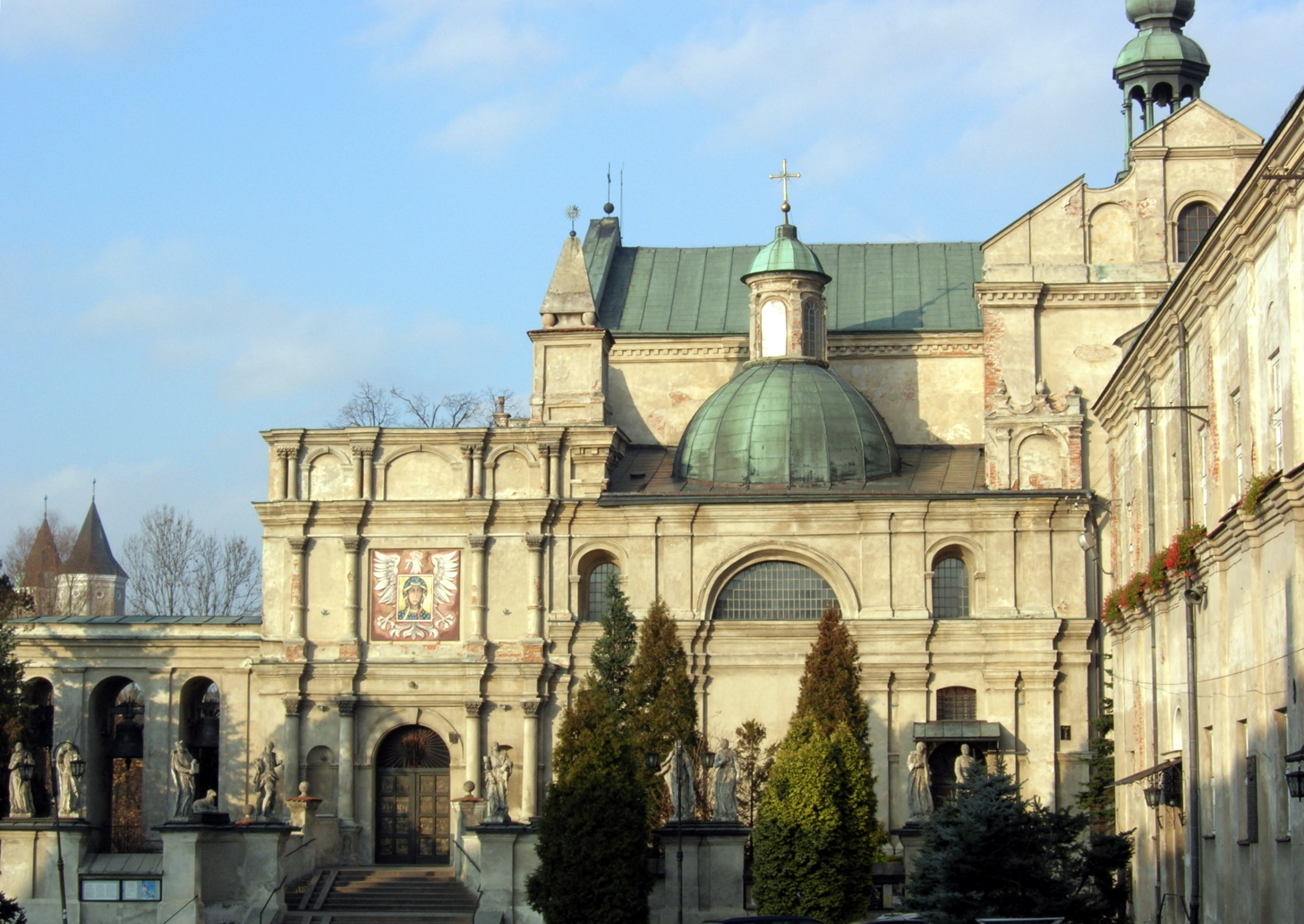 Jarosław (Poland), Kolegiata Bożego Ciała